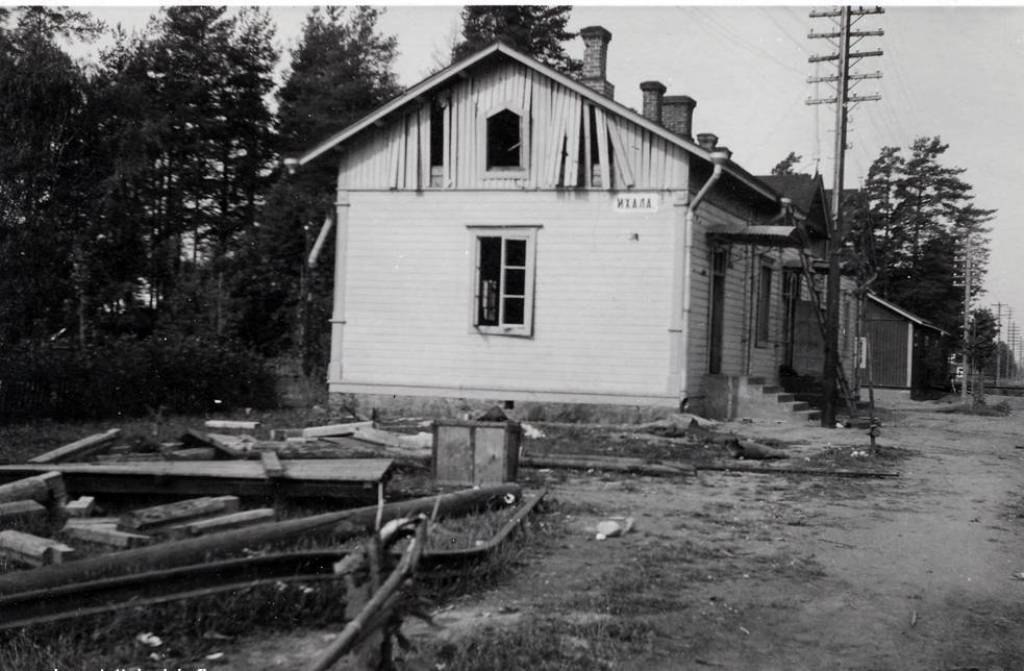 Повреждённый вокзал ст. Ихала, авг 1941 год.